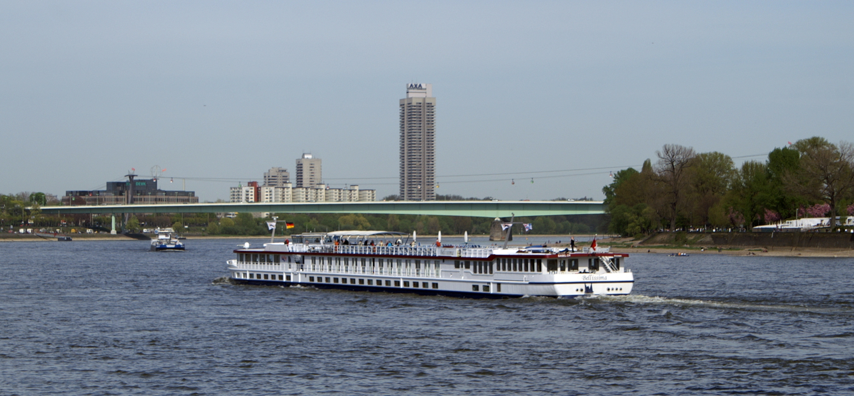 Flusskreuzfahrtschiff Bellissima auf Fahrt in Köln.